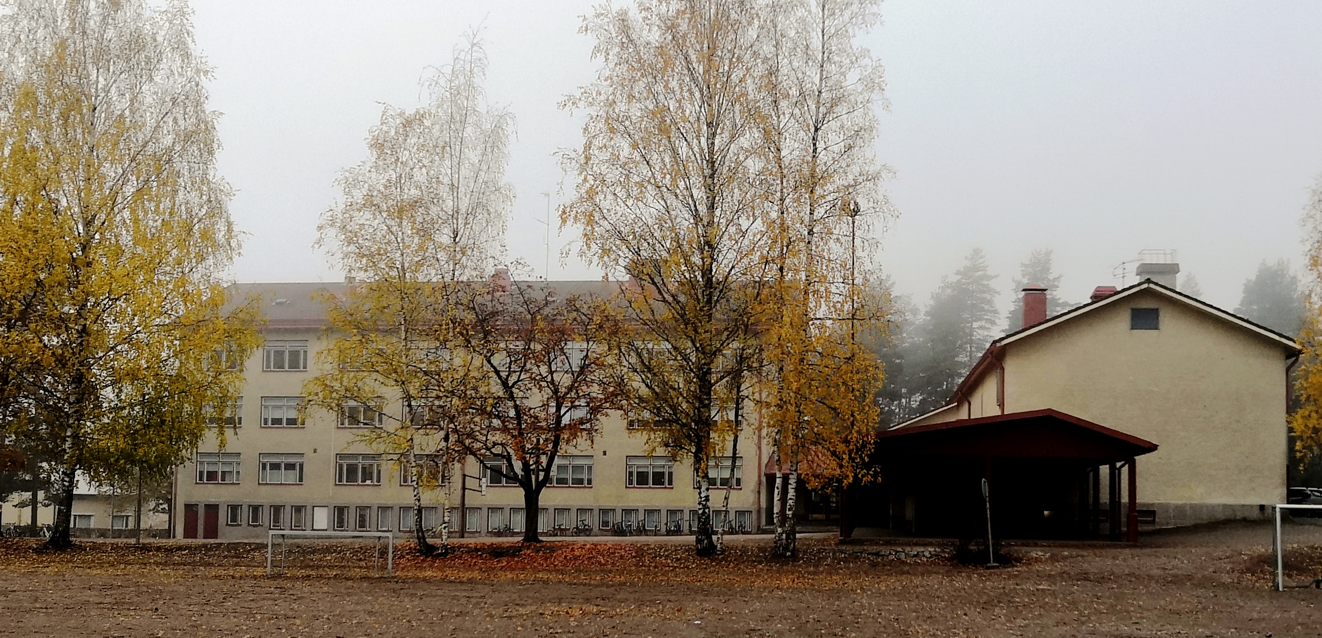 Tornionmäen koulu syyssäässä lokakuussa 2019